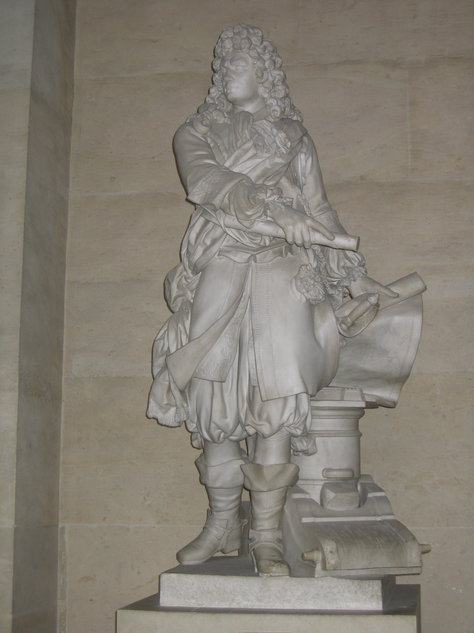 Statue en pied conservée au Musée nationale des châteaux de Versailles et de Trianon, Musée de l'histoire de France, Versailles, Yvelines, France.